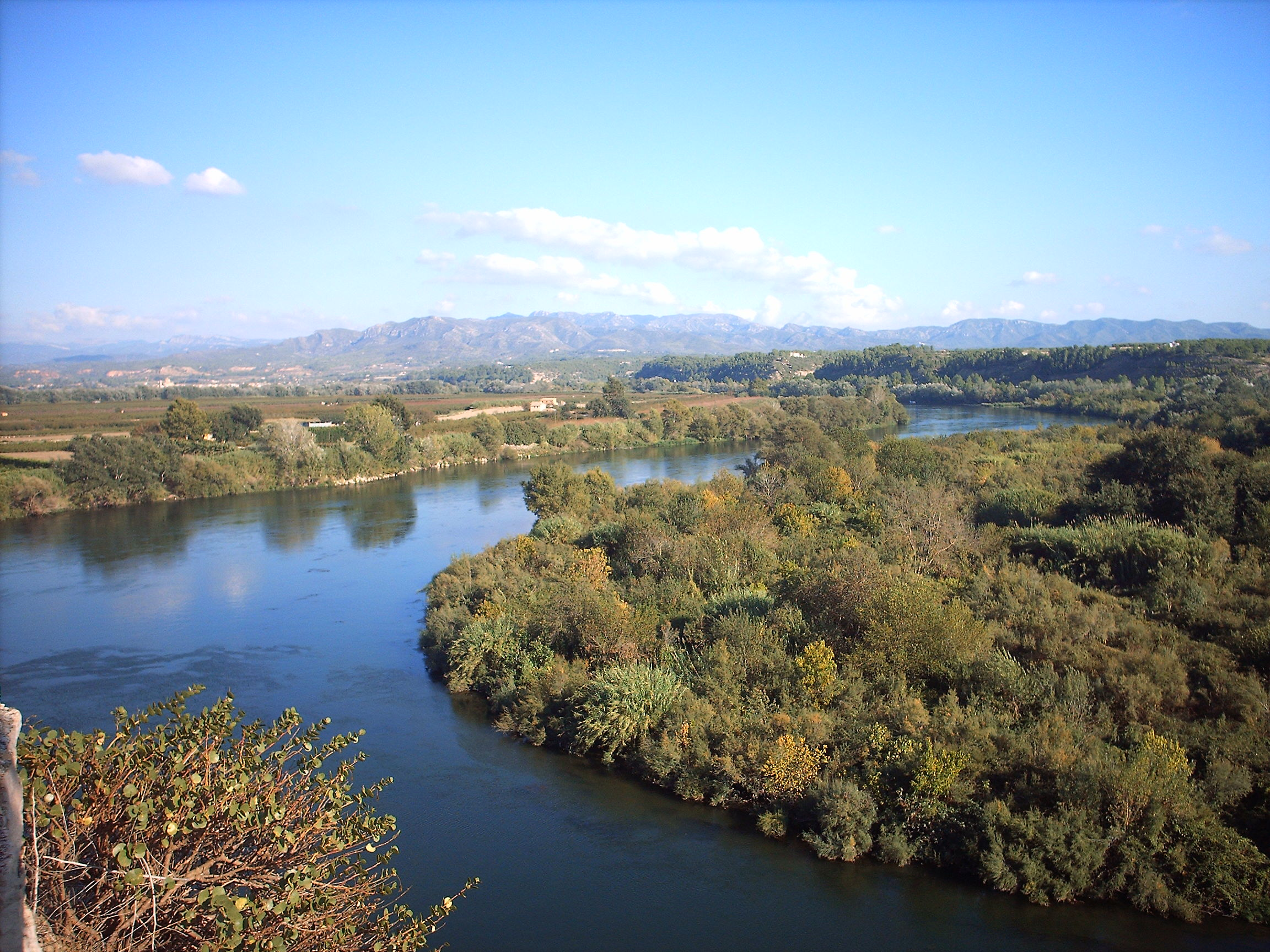 Riu Ebre al seu pas per Miravet